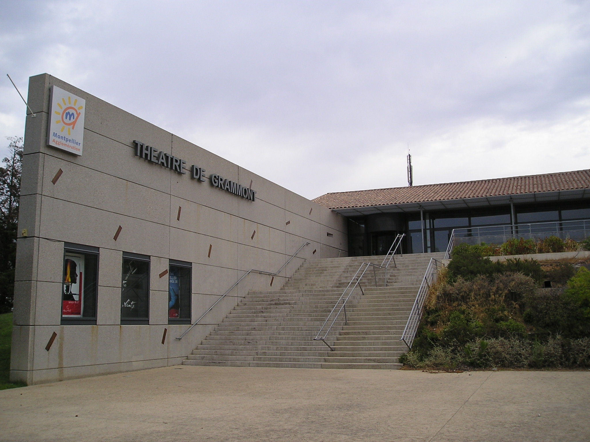 L'entrée du théâtre de Grammont de Montpellier.